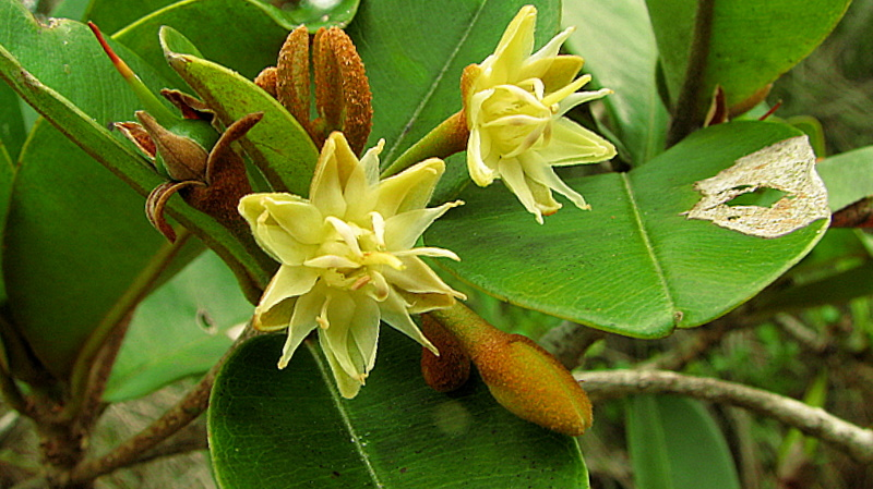 Manilkara dardanoi Ducke